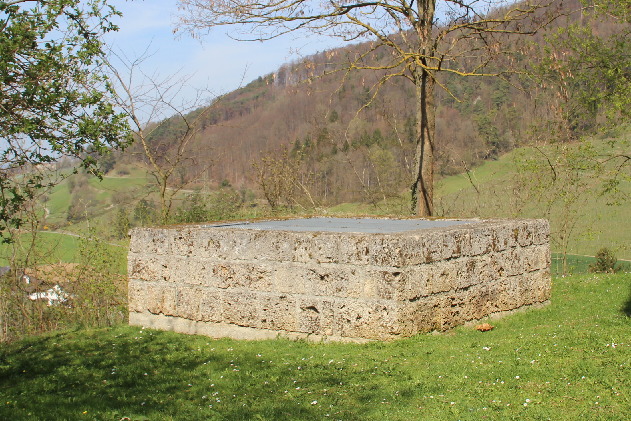 Ruine Freienstein Brunnen